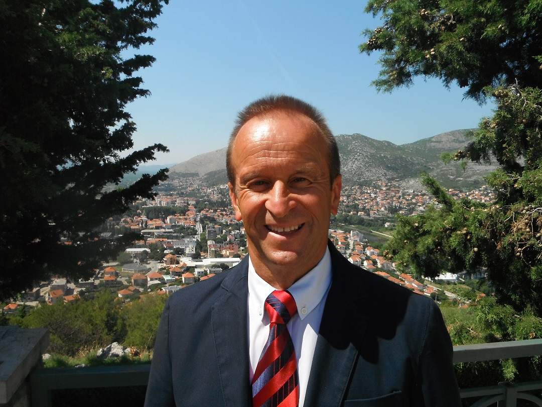 Srpski (latinica): Dragan Đokanović u Trebinju.